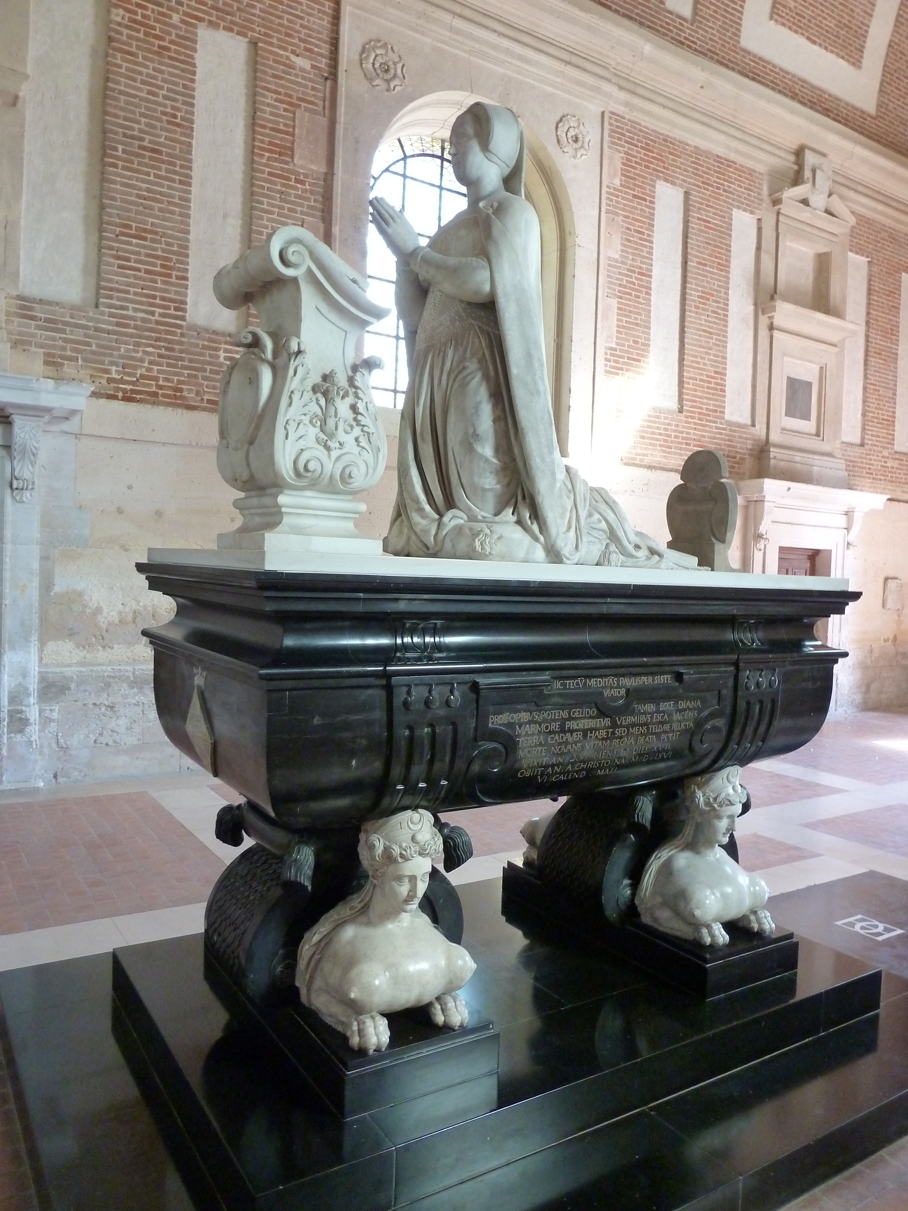 Château d'Anet - Anet - Eure-et-Loir - France .